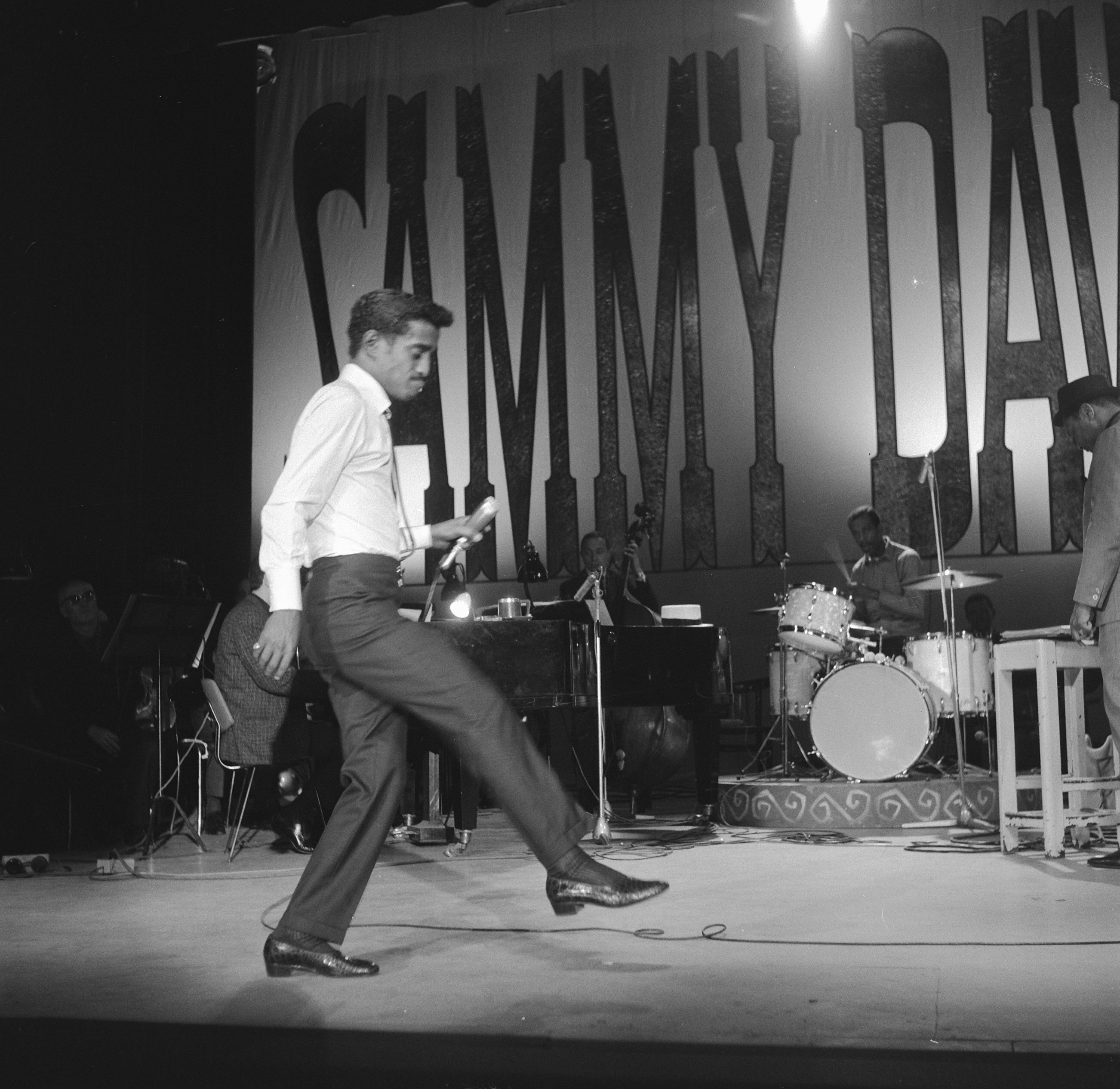 Collectie / Archief : Fotocollectie Anefo Reportage / Serie : [ onbekend ] Beschrijving : Sammy Davis Jr. tijdens optreden in theater Carre Datum : 20 maart 1964 Locatie : Amsterdam, Noord-Holland Trefwoorden : Optredens, theaters Instellingsnaam : Carré Fotograaf : Gelderen, Hugo van / Anefo Auteursrechthebbende : Nationaal Archief Materiaalsoort : Negatief (zwart/wit) Nummer archiefinventaris : bekijk toegang 2.24.01.03 Bestanddeelnummer : 916-2036